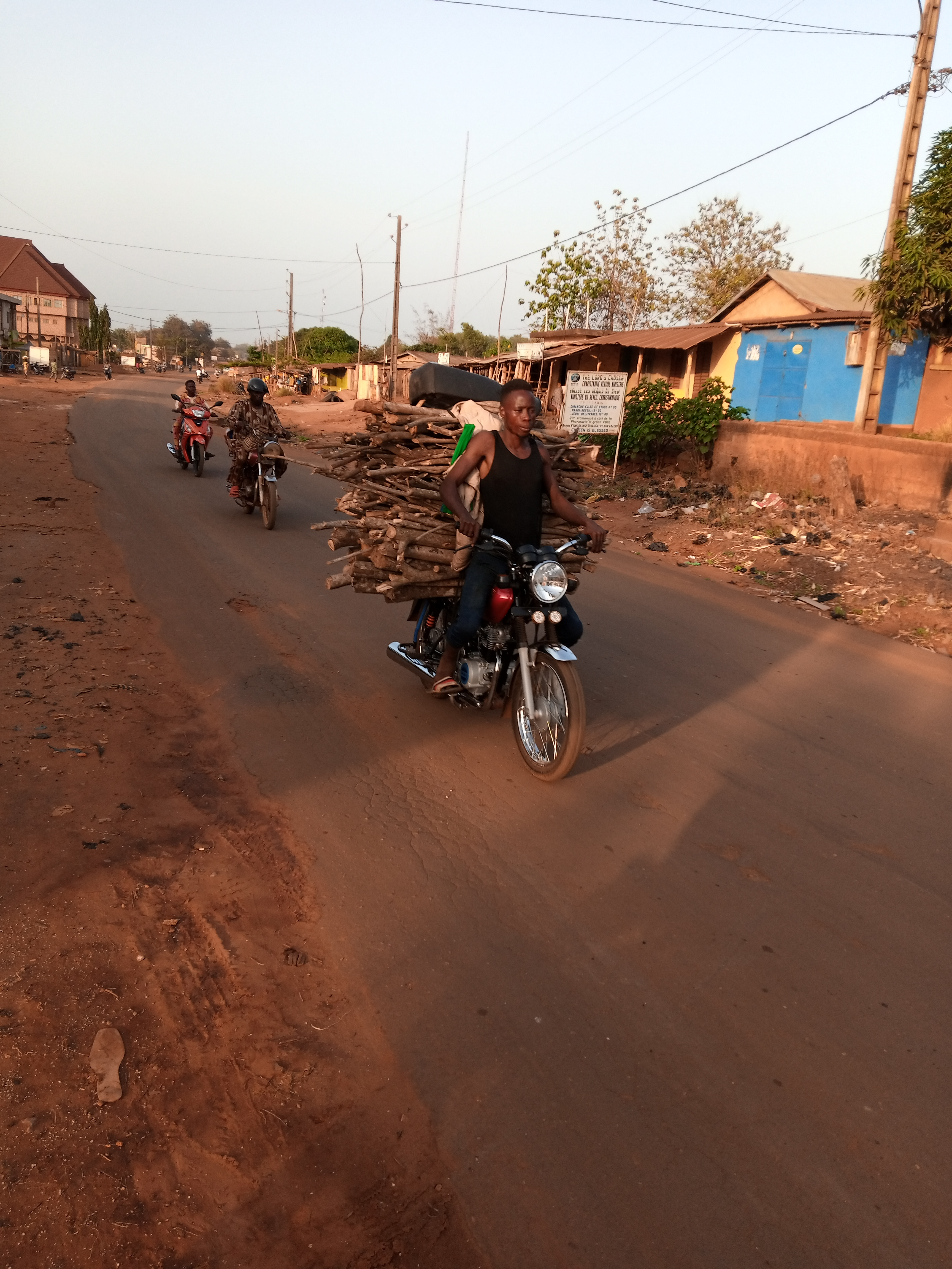 bois de chauffage This is an image with the theme "Africa on the Move or Transport" from: Benin